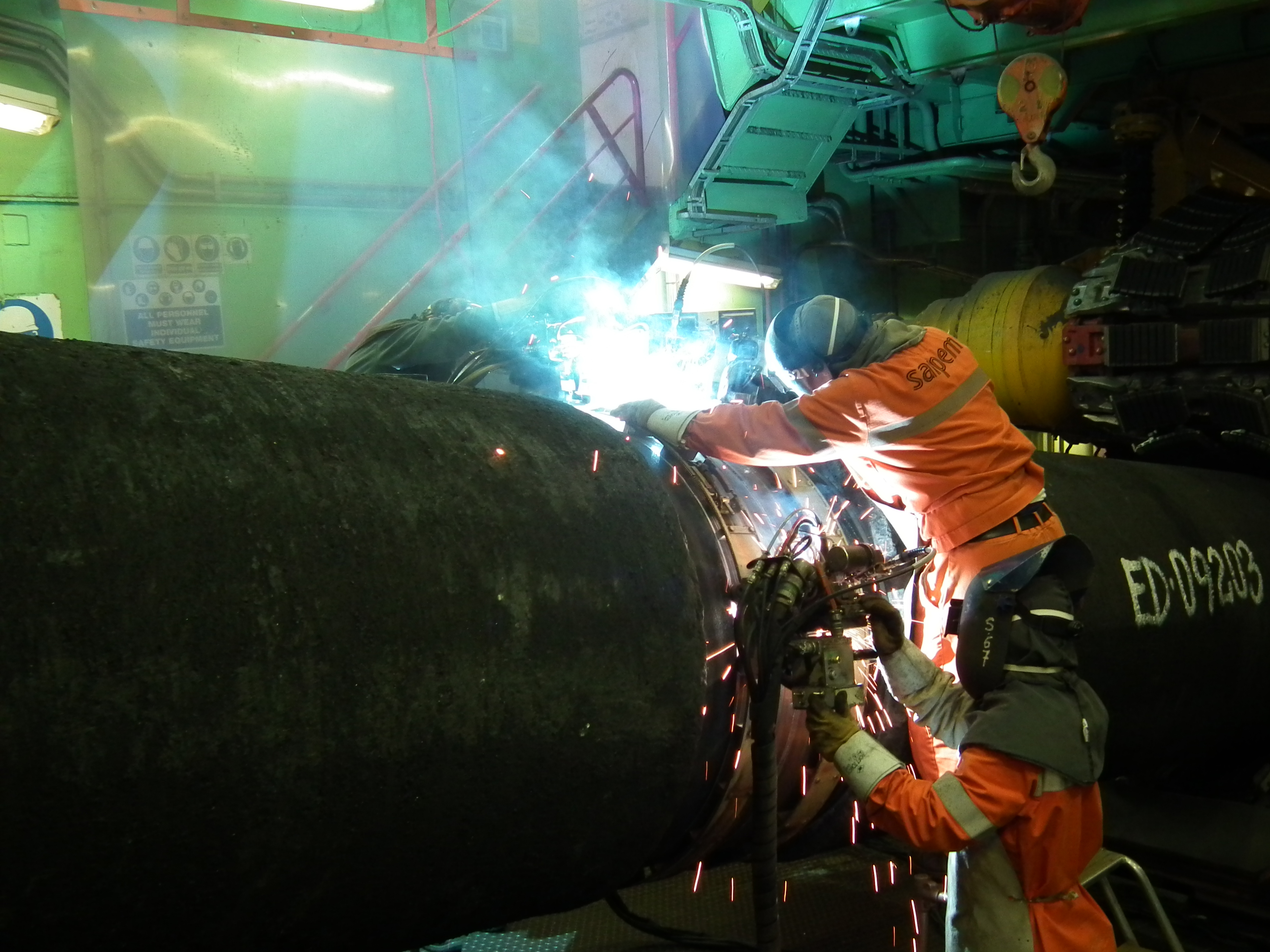 Två av 200 000 rör som utgör naturgasledningen Nord Stream svetsas ihop ombord på det italienska rörläggningsfartyget Castoro Sei 2011.